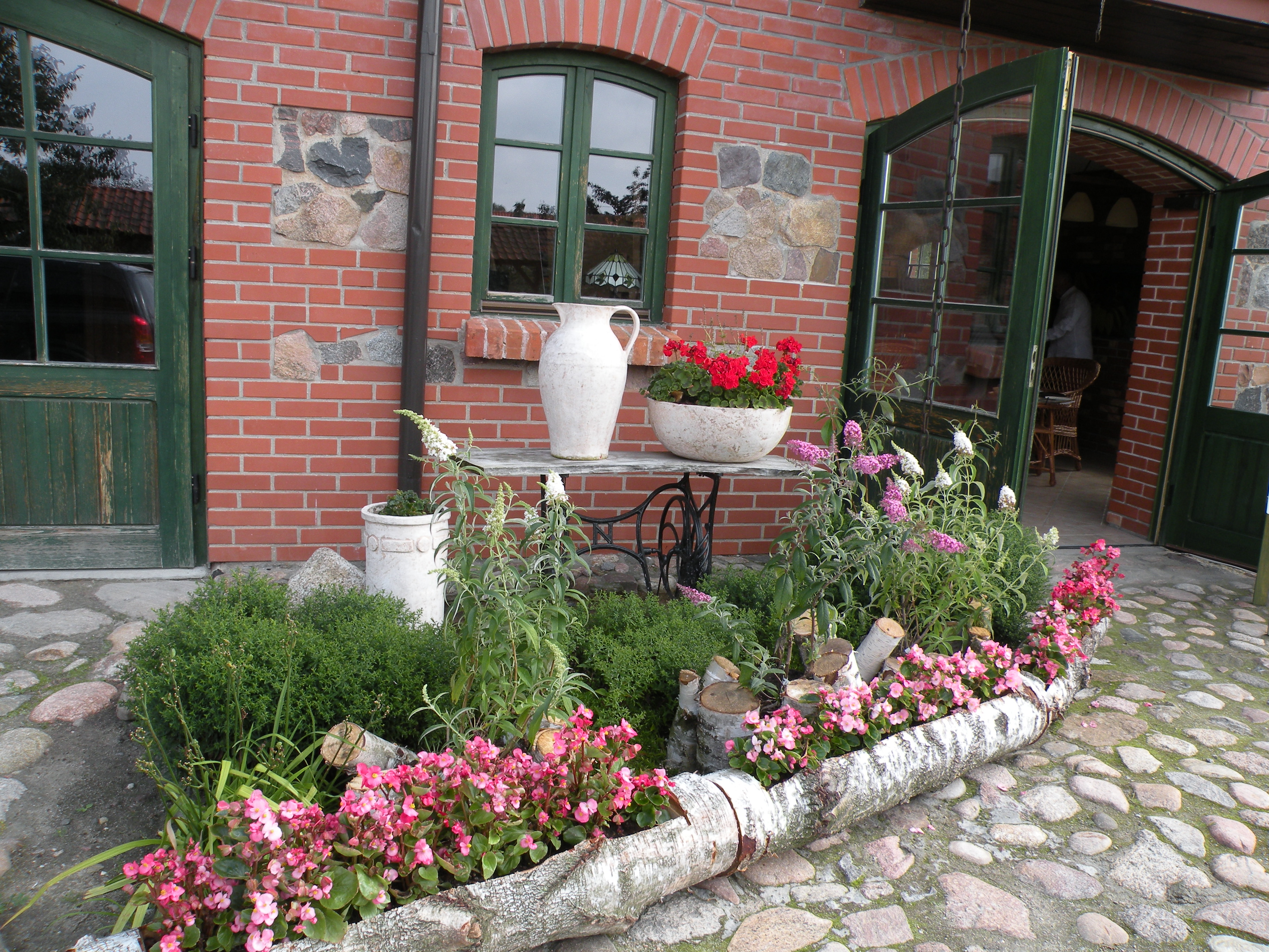 Kamio9nka koło NIdzicy, Garncarska Wioska i Rajskie Ogrody